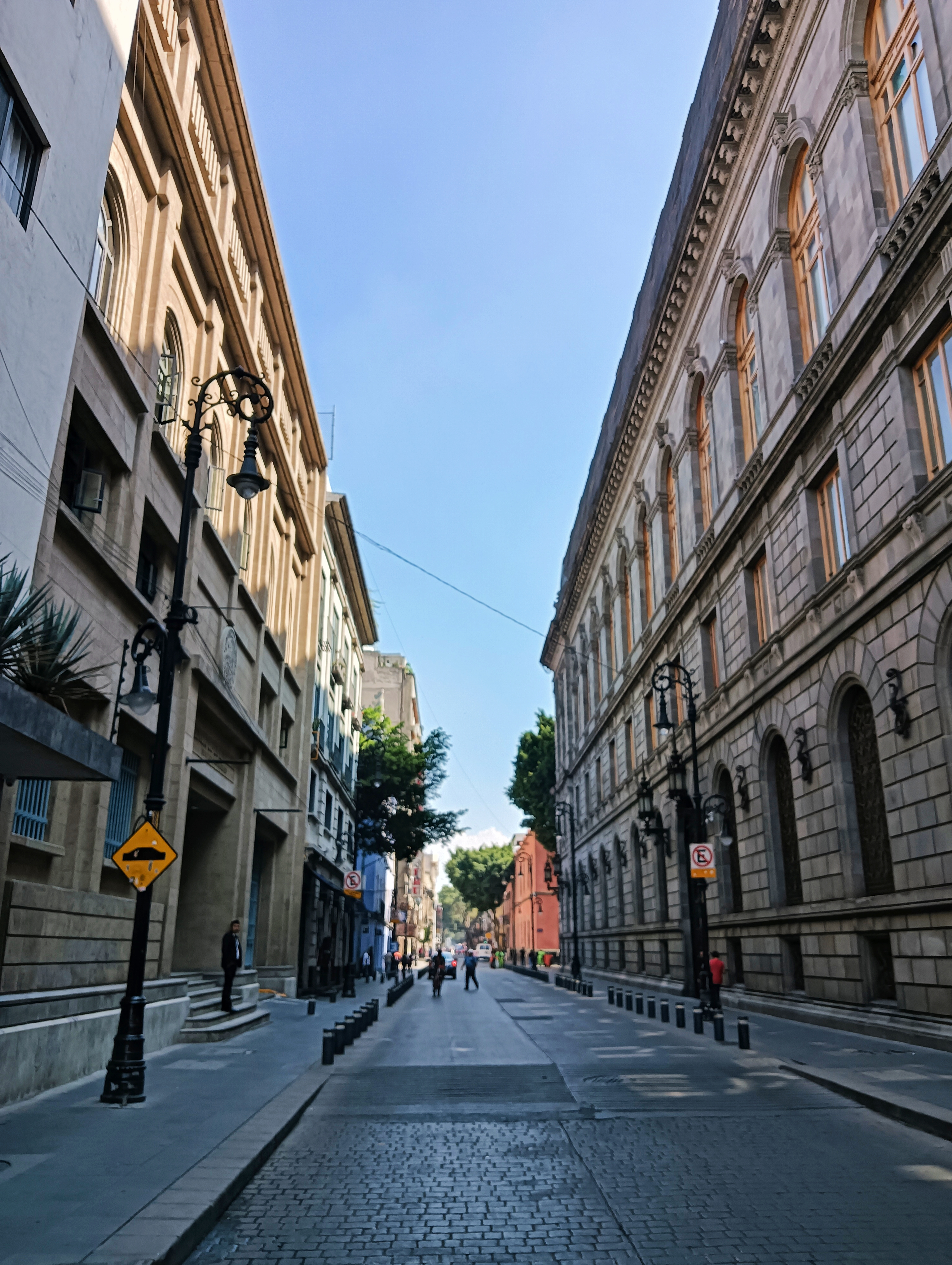 Vista de la calle de Donceles, centro histórico de la Ciudad de México